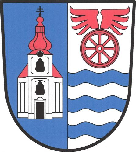 Znak obce Poříčany